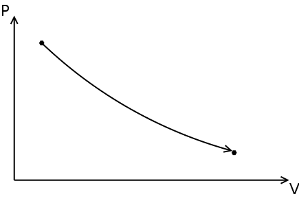 Darstellung einer isothermen Zustandsänderung in einem PV-Diagramm